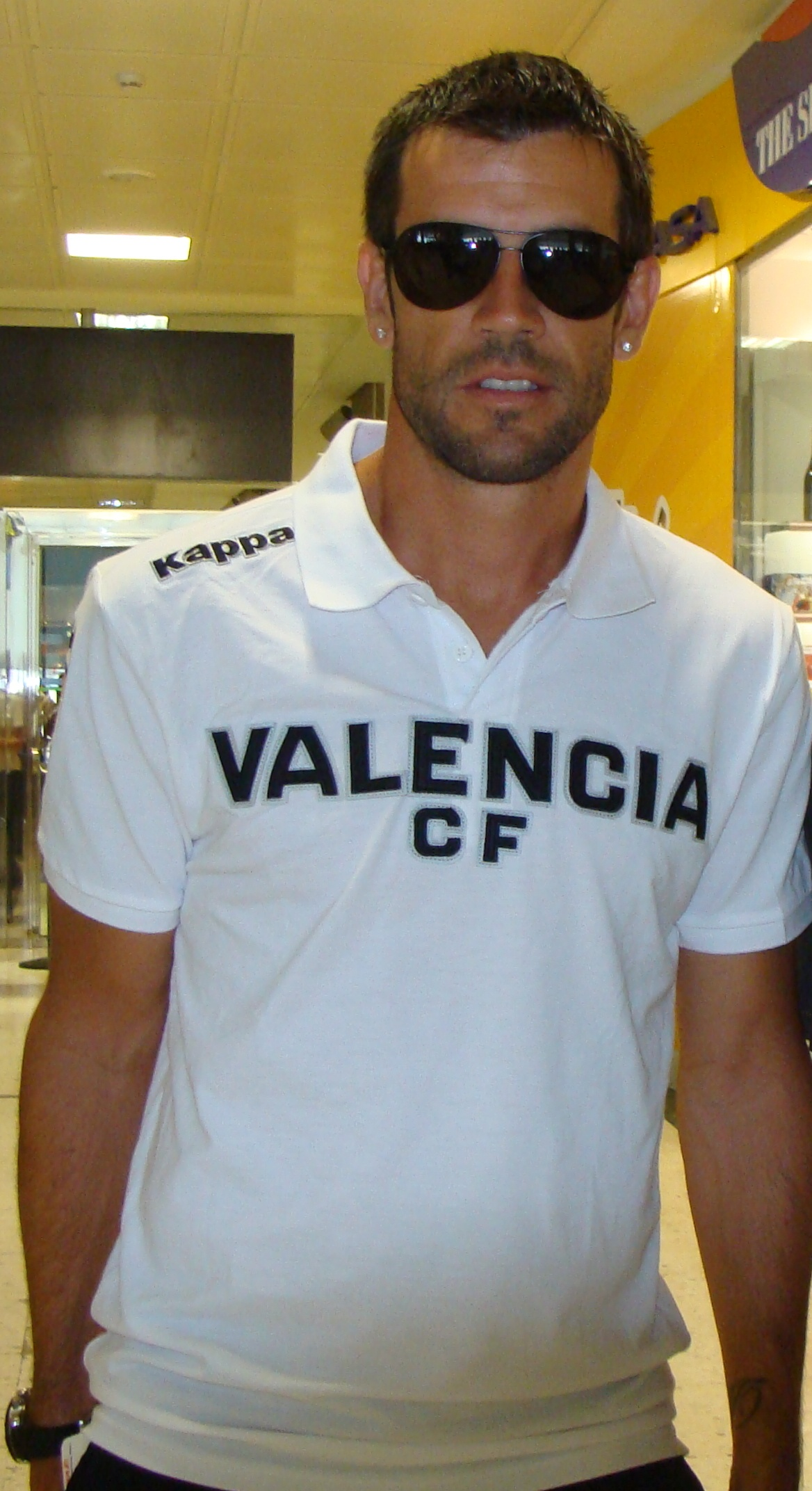 David Albelda durante la pretemporada con el Valencia CF